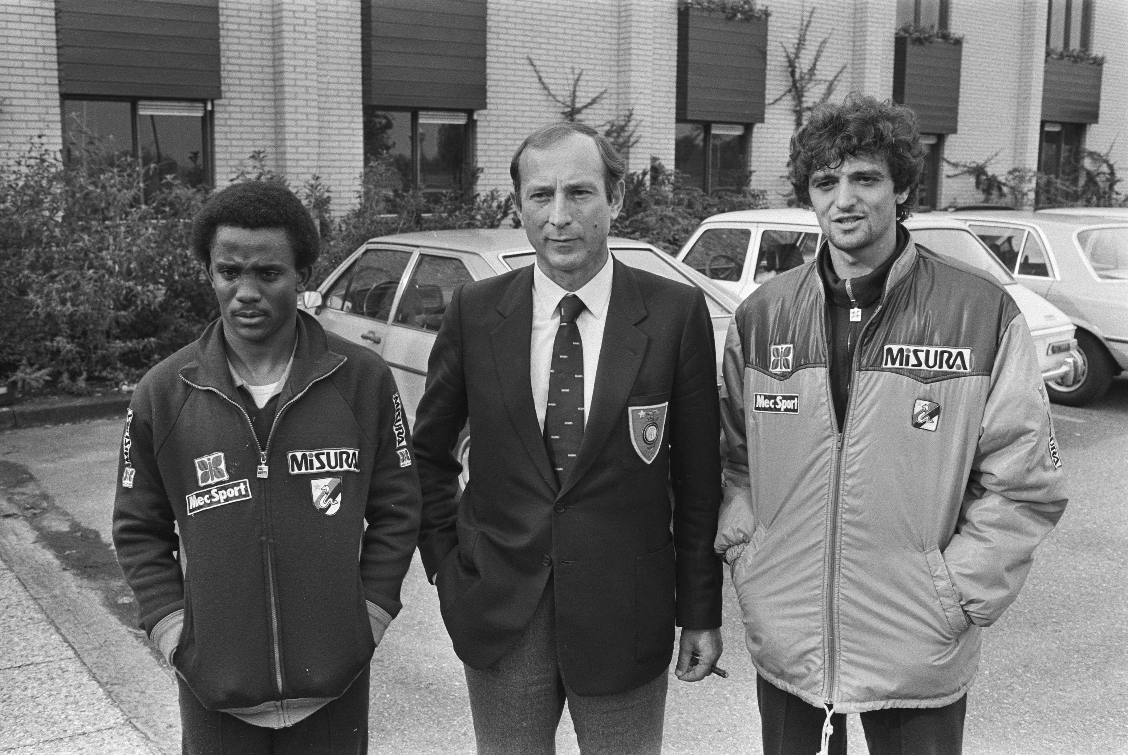 Heilo, Noord-Holland. Inter Milaan in Motel Heilo. V.l.n.r. Juary Jorge dos Santos Filho, trainer Rino Marchesi en Alessandro Altobelli.